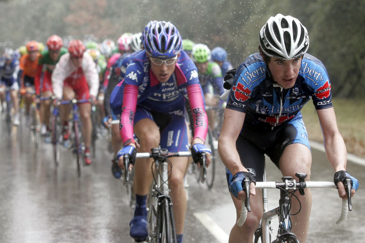 Afbeelding van Isidro Nozal.